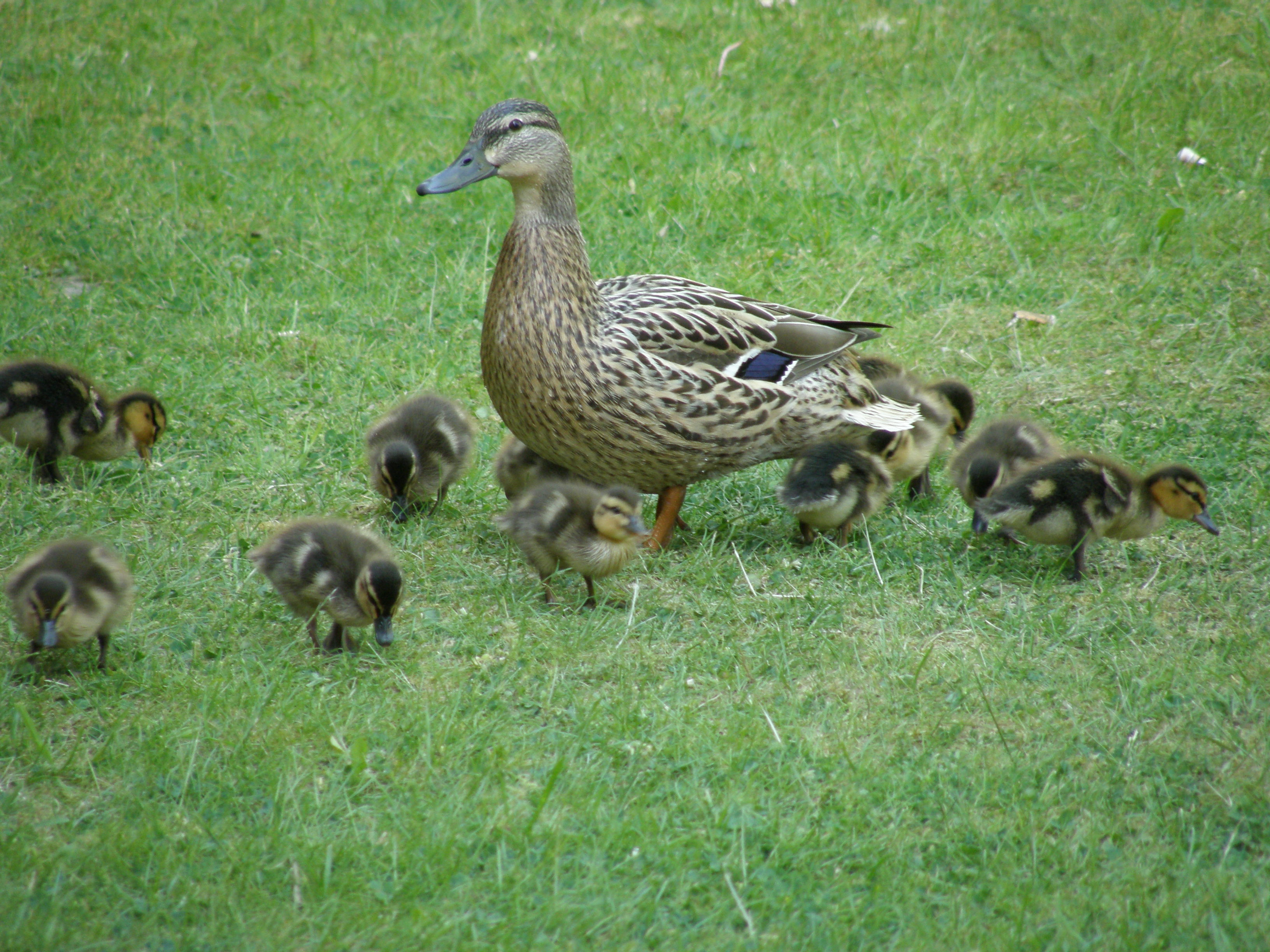 Stockente, Duck, Park near/in Kiel